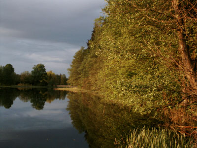 Rzeka Gwda powyżej miasta Piły